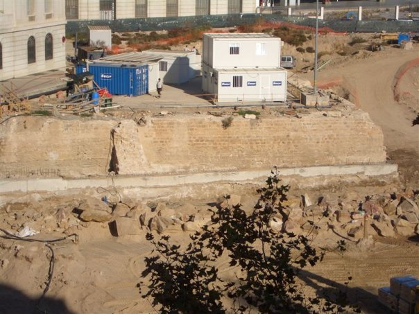 Descoberta del Baluard de Migdia